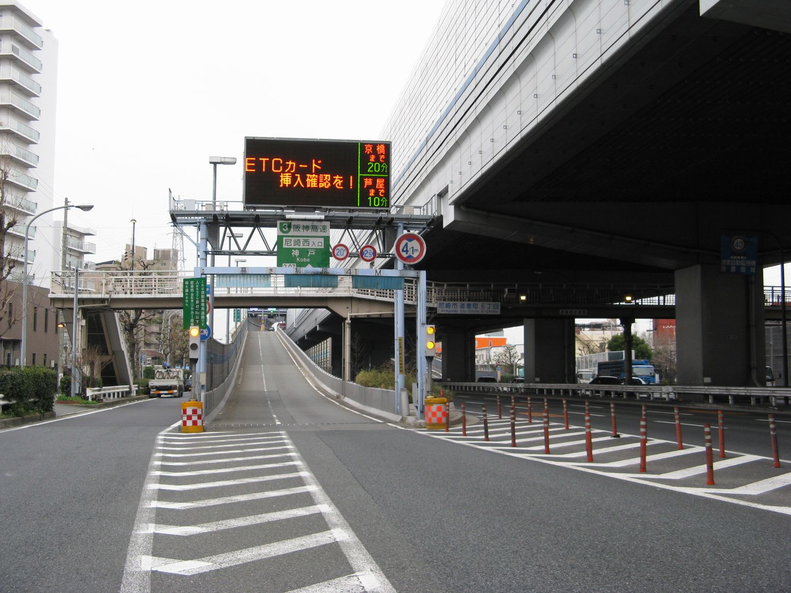 阪神高速尼崎西出入口 西行き入口を西望